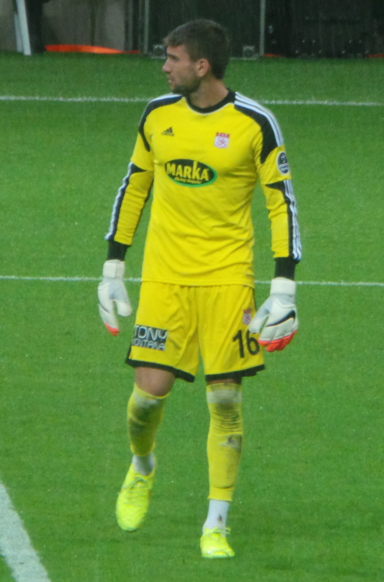 Mahmut Ertuğrul Taşkıran Sivasspor ile